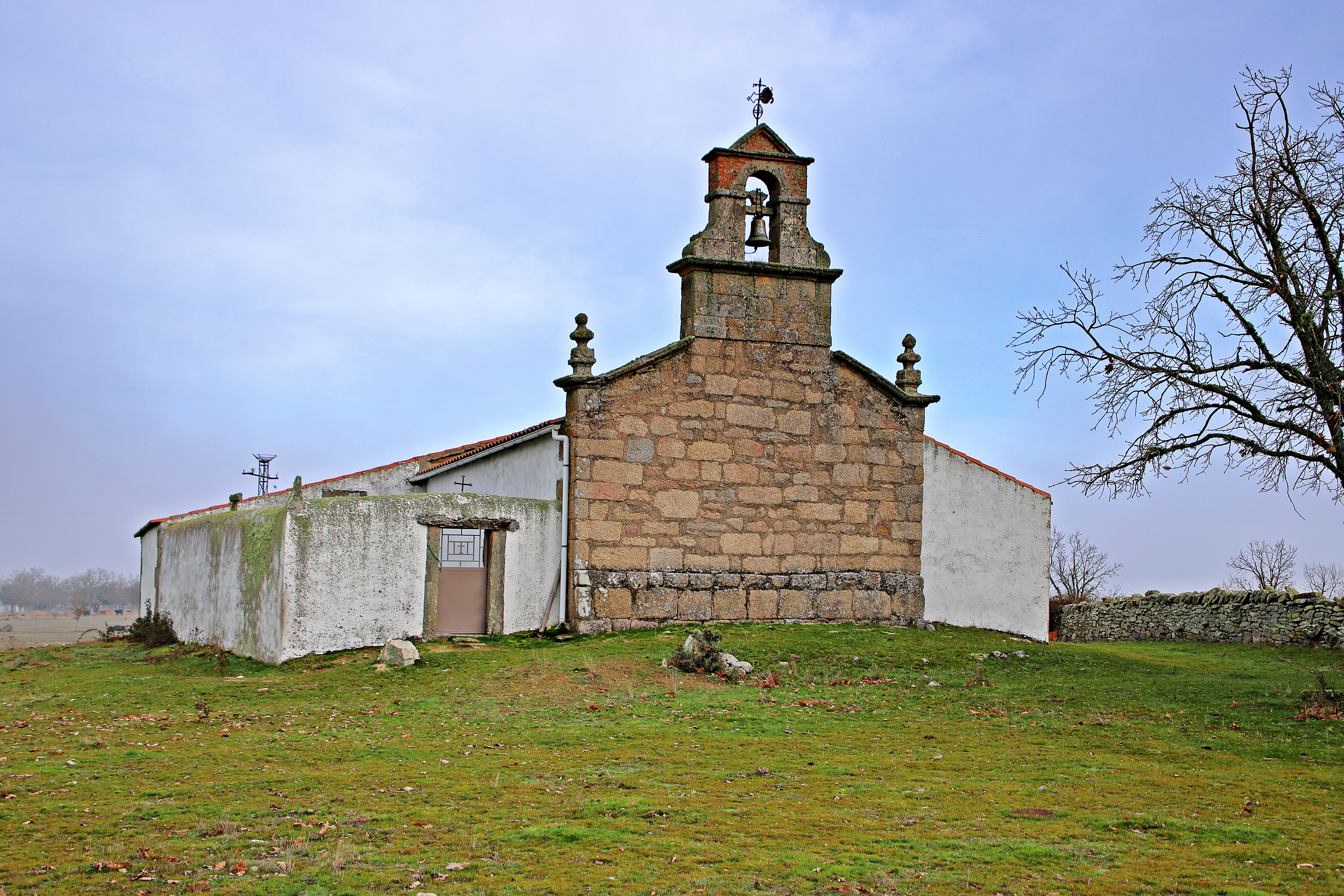 Localidad del municipio de Espadaña, en la comarca de Vitigudino, provincia de Salamanca.